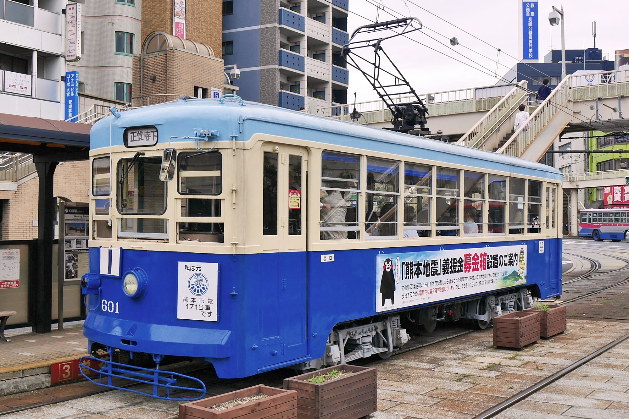 車内に熊本地震義援金の募金箱を設置した長崎電気軌道600形（元熊本市電170形）「がんばれ!!熊本号」。長崎駅前にて撮影。